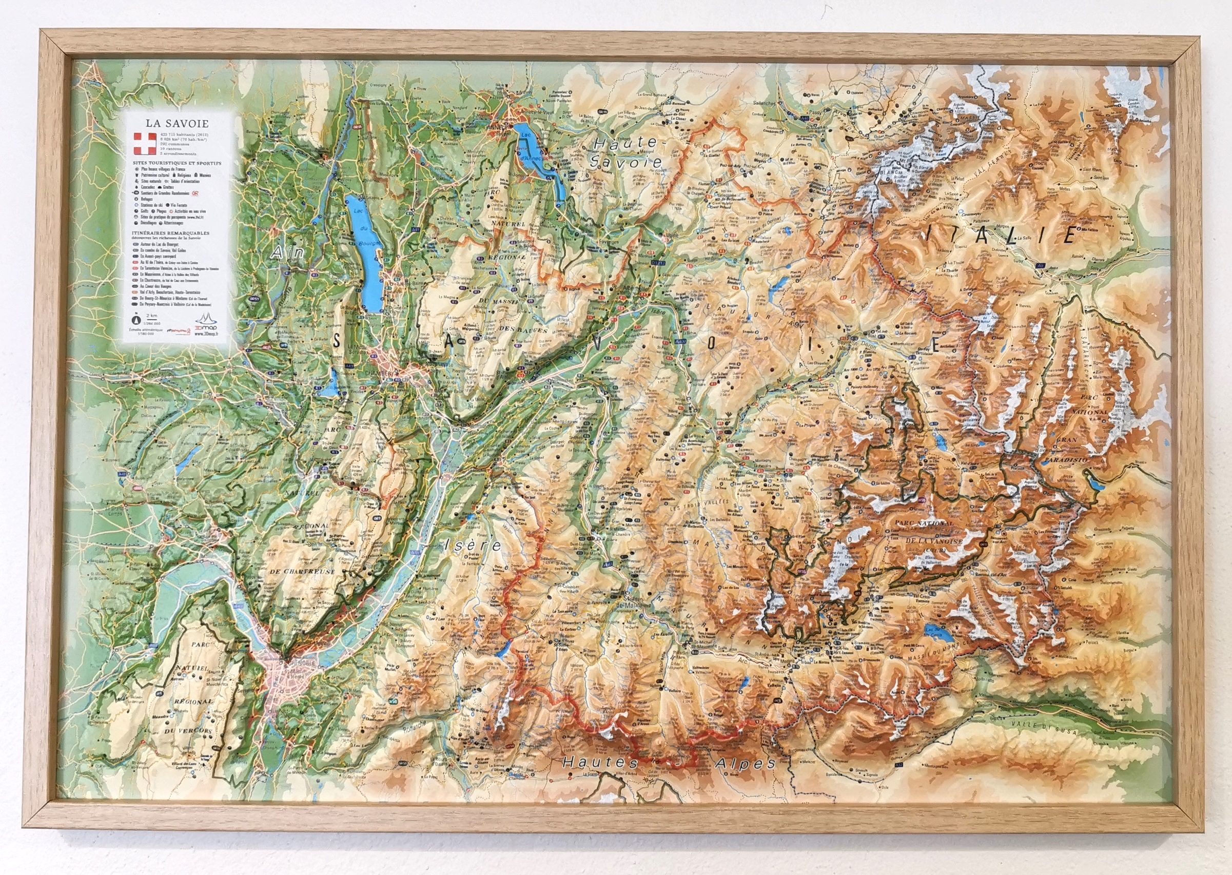 Carte en relief de la Savoie réalisée par la société Française 3Dmap à l'échelle 1/264000.